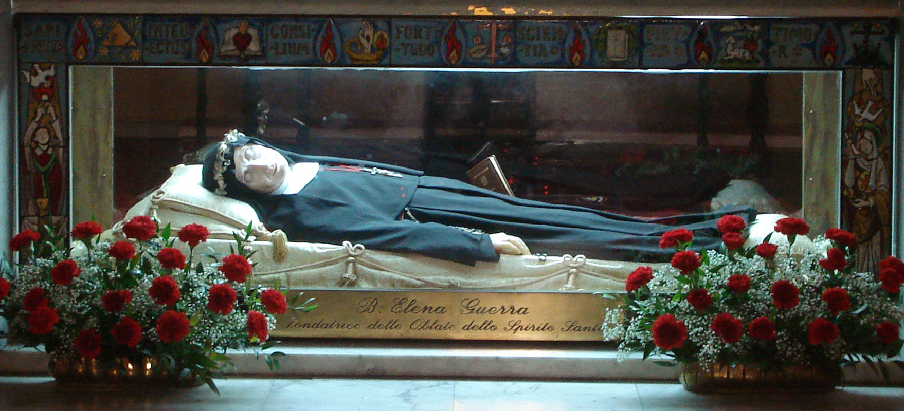 Corpo da beata Elena Guerra na Igreja de S. Agostino, Lucca